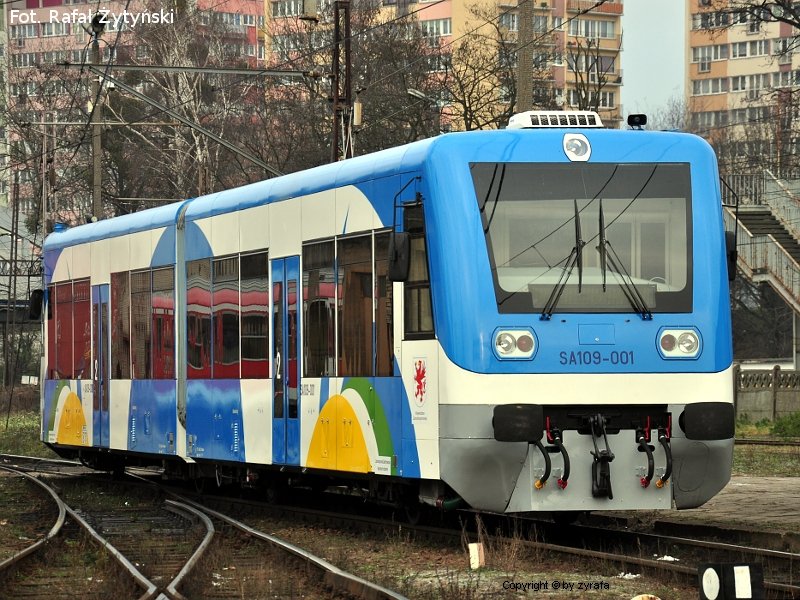 SA109-001 w malowaniu województwa zachodniopomorskiego.